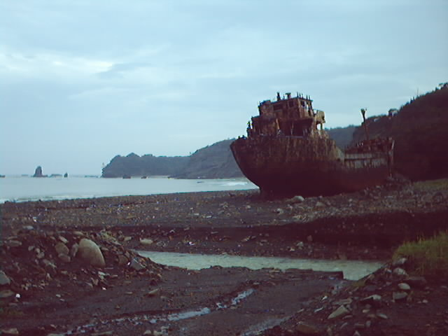 放棄された座礁船